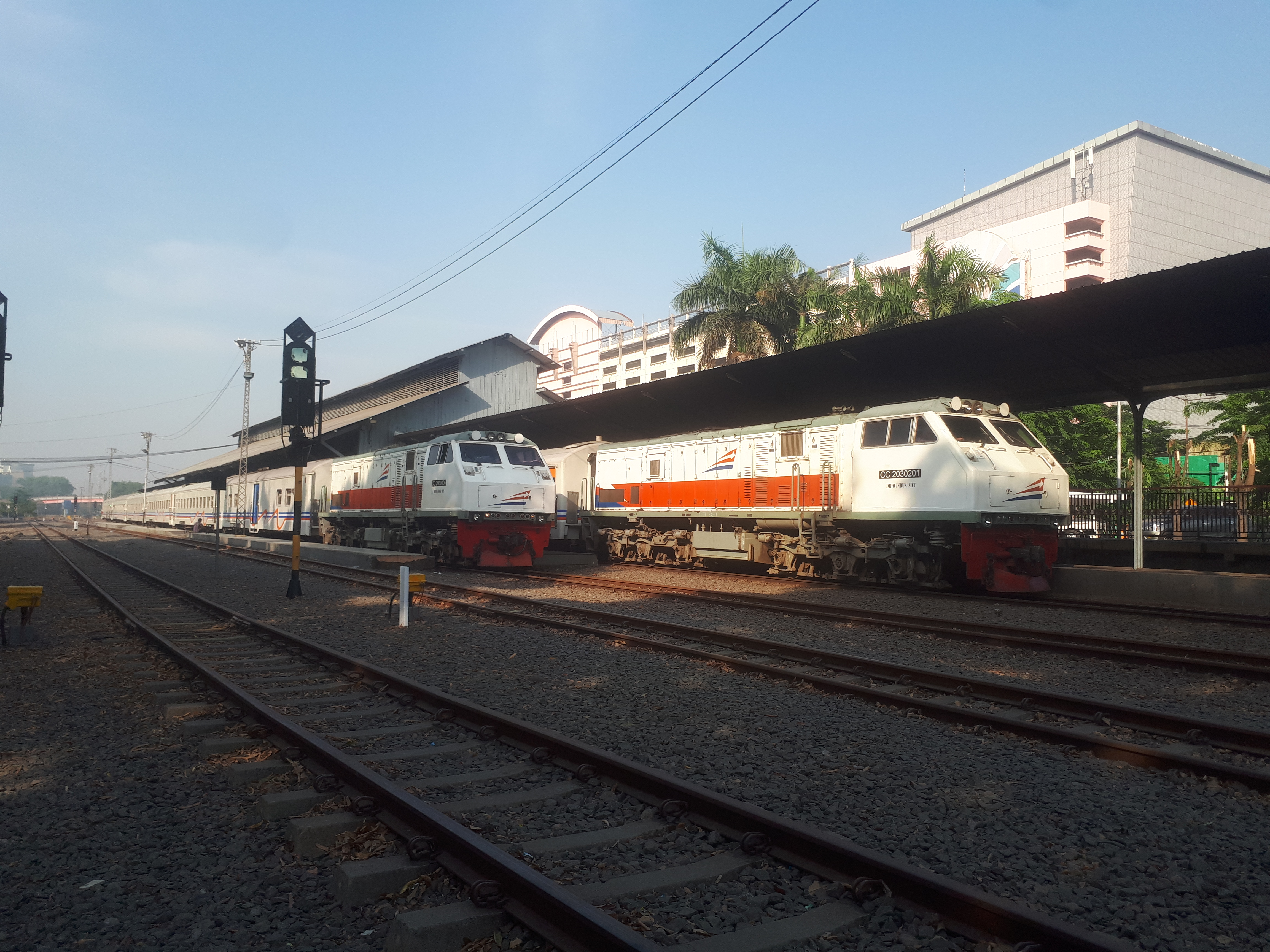 Stasiun Wonokromo tahun 2019 dengan kereta lokal Kertosono dan KA Penataran.